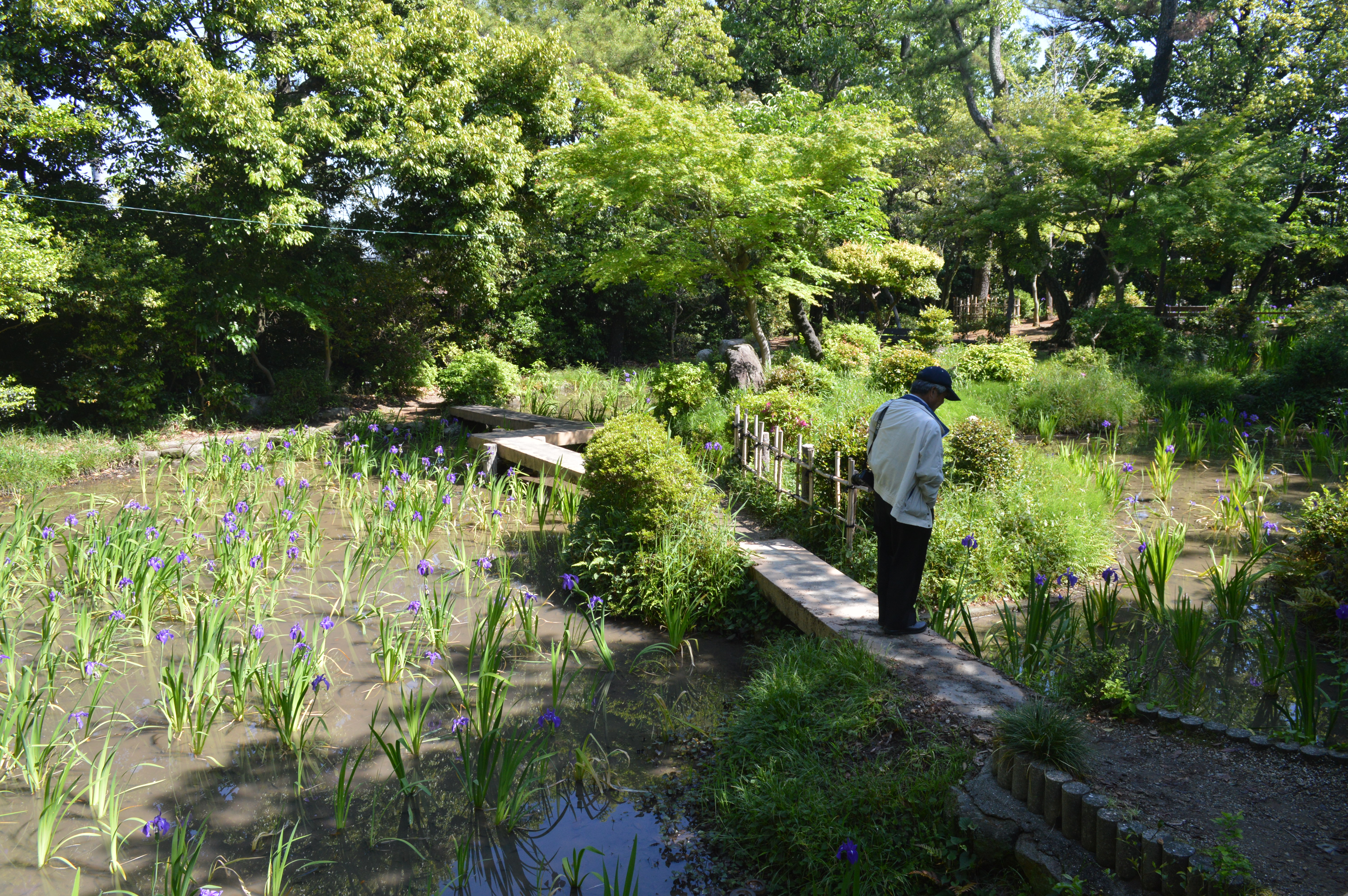 無量寿寺のカキツバタ園、愛知県知立市